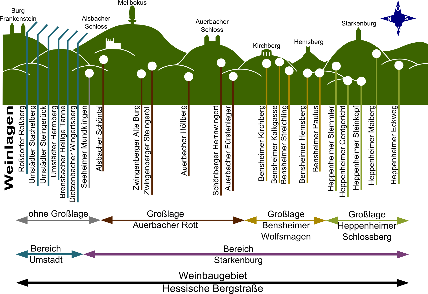 Übersichtskarte der Weinlagen und Bereiche des Weinbaugebietes Hessische Bergstraße. Version 4